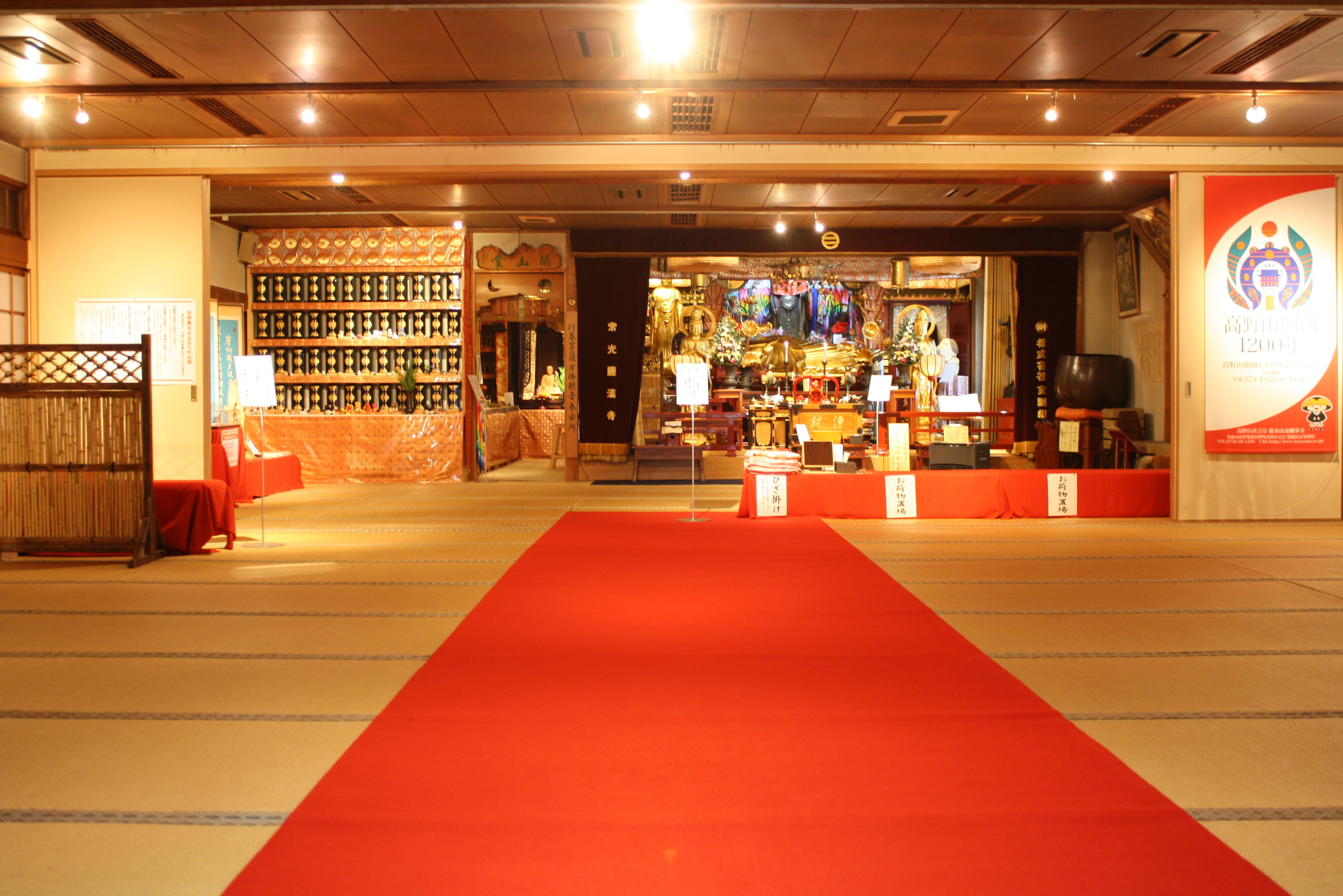 子供たちを優しく見守りくださるお地蔵さま。水子さまのお参りや、我が子の健やかな成長を願ってのお参りが絶えません